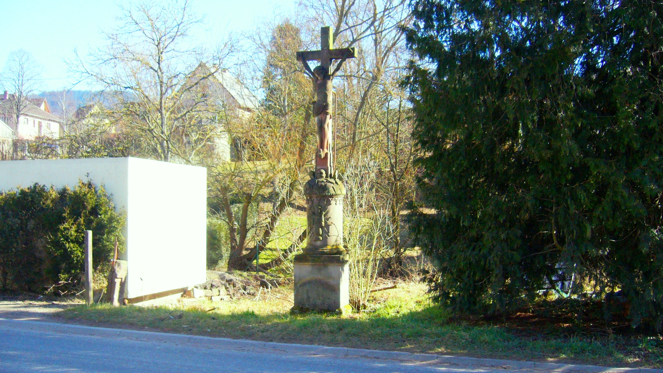 Thanvillé 012.JPG